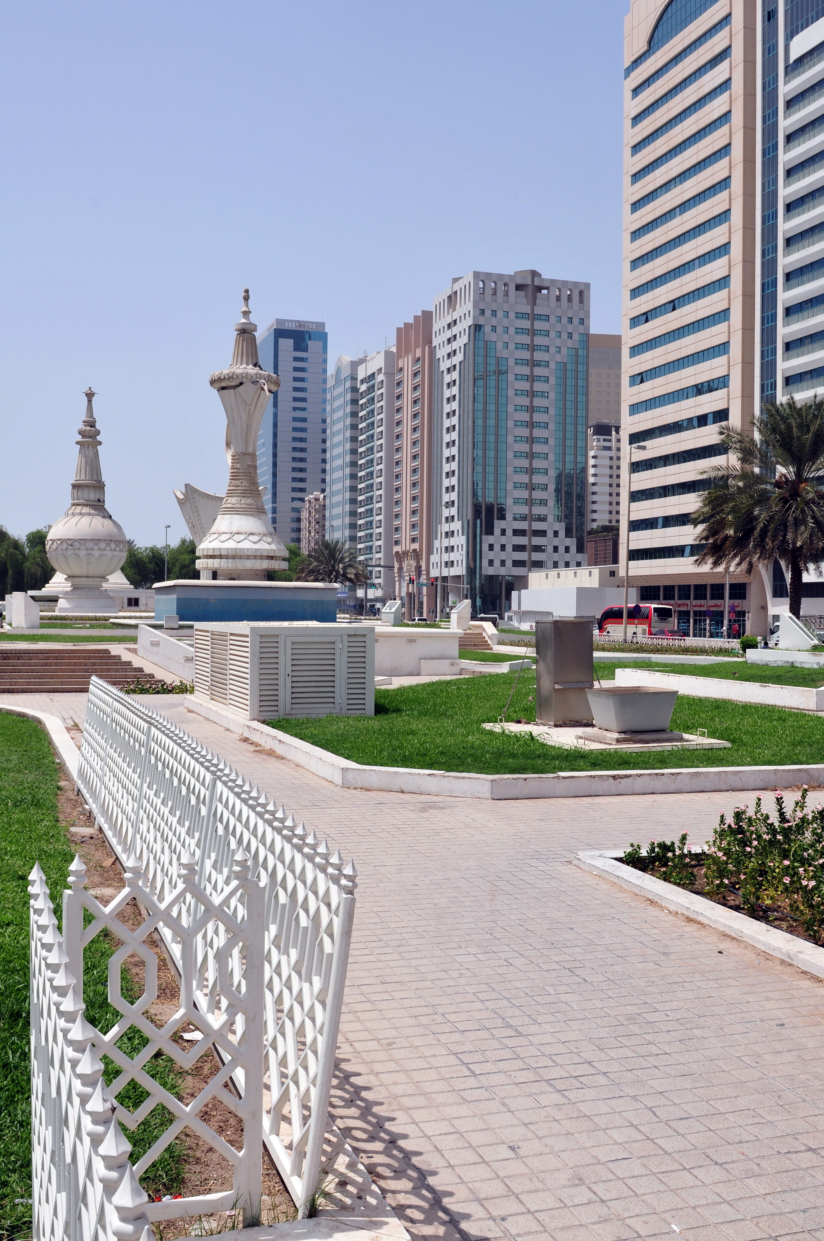 travel to Wikimania 2013: Abu Dhabi